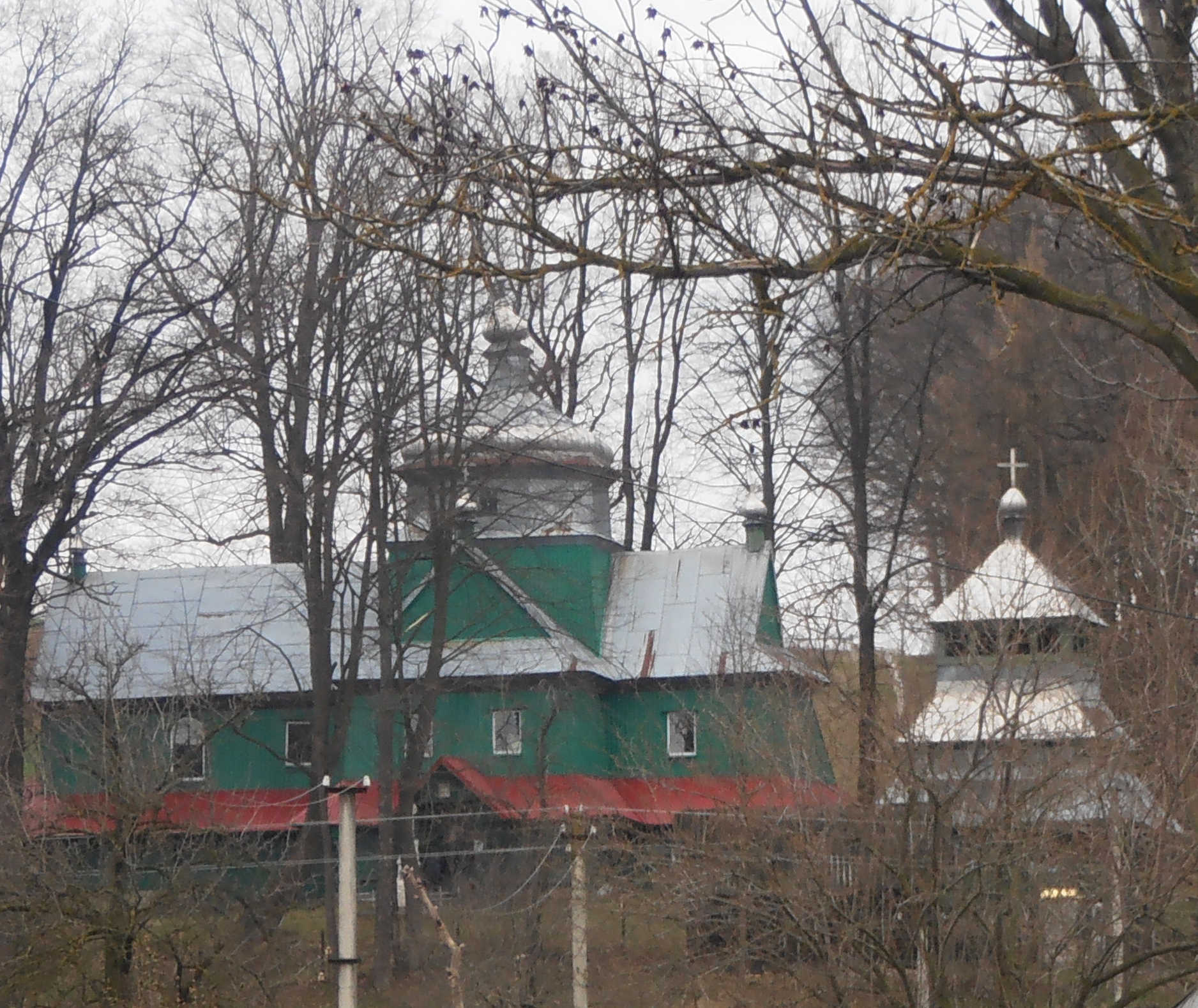 Церква